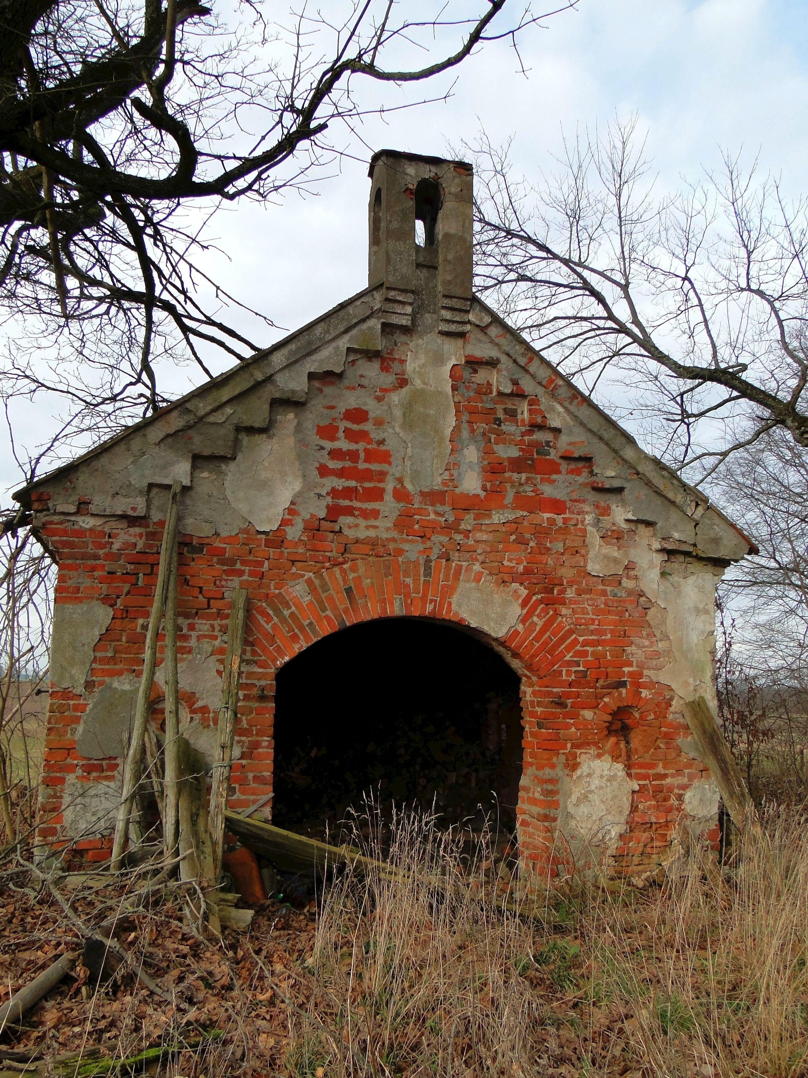 Niszczejąca nieużywana kuźnia